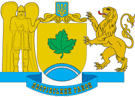 Герб Яворівського району